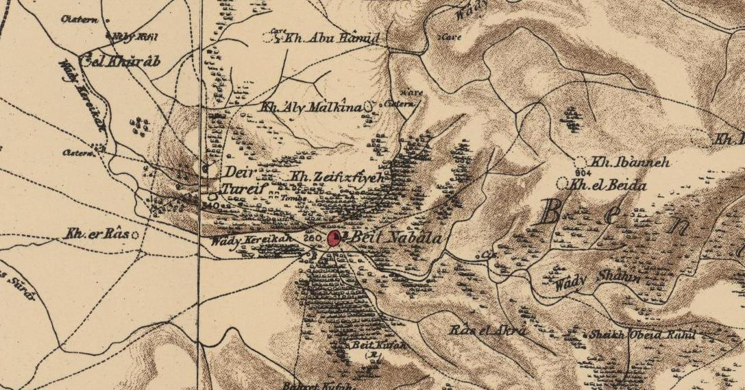 מפת בית נבאללה 1880 PEF